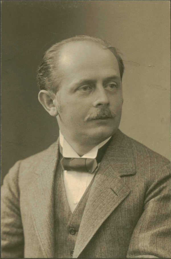 Porträt von Gustav Adolf Huber (Musiker)